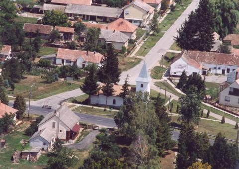 Ötvöskónyi, Hungary, aerialphotography. Havas Boldogasszony római katolikus kápolna